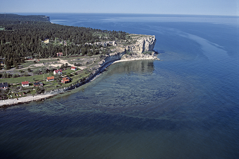 Bilden troligen från 1980-talets början. Motiv: Högklint Nyckelord: Flygbilder, Naturreservat, Riksintressen Kategori: Kust- och skärgårdsmiljö Bilden troligen från 1980-talets början.